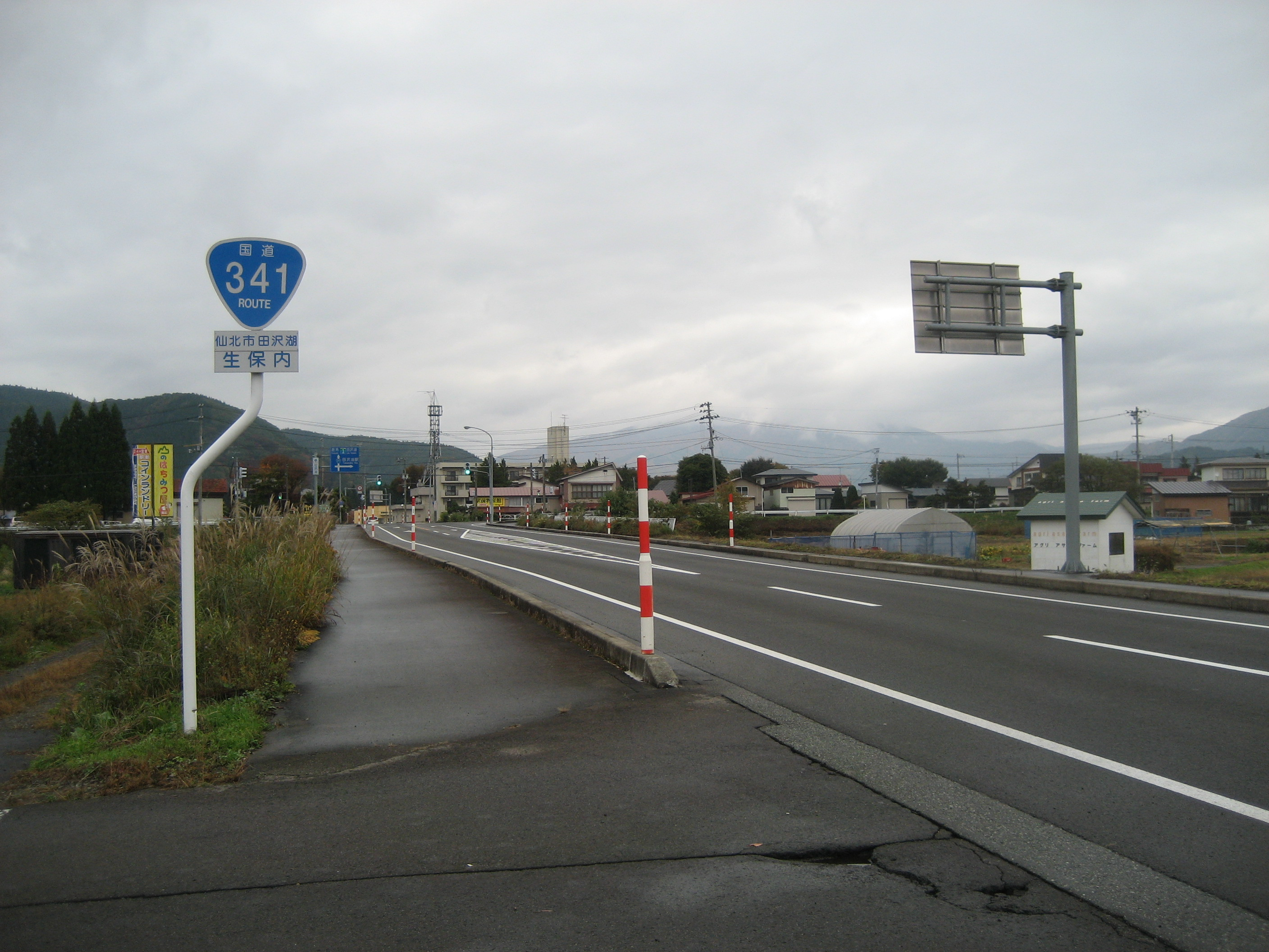 国道341号線秋田県仙北市田沢湖生保内付近